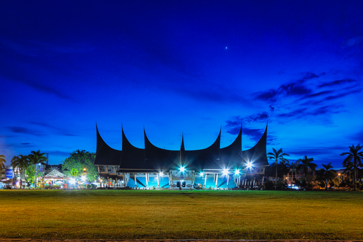 Ruang Terbuka Hijau (RTH) Imam Bonjol, Padang pada 20 Agustus 2013.